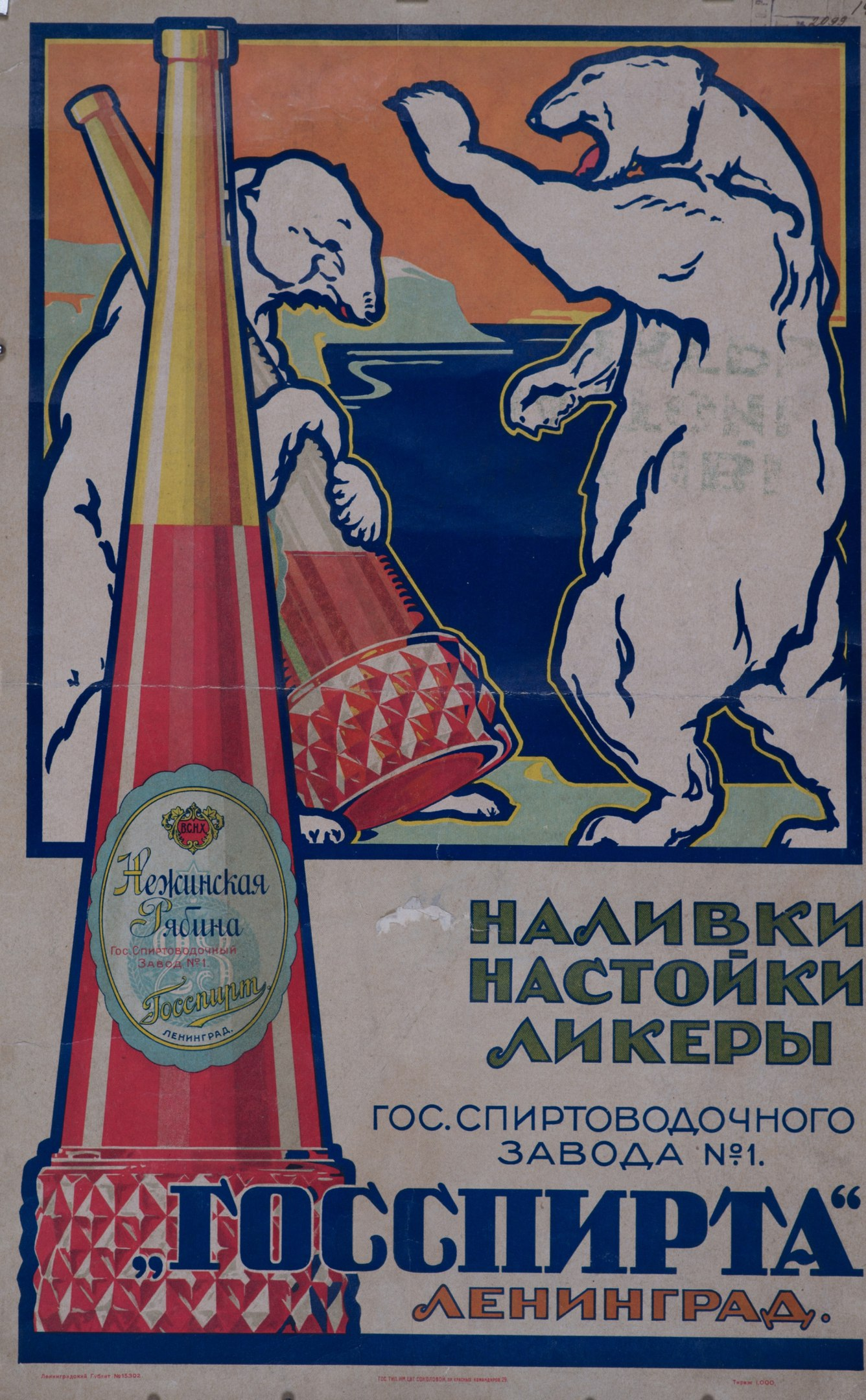 Рекламный плакат продукции «Госспирта». Ленинград, 1920-е годы. Хромолитография, 53×34 см. Тираж 1000 экз.